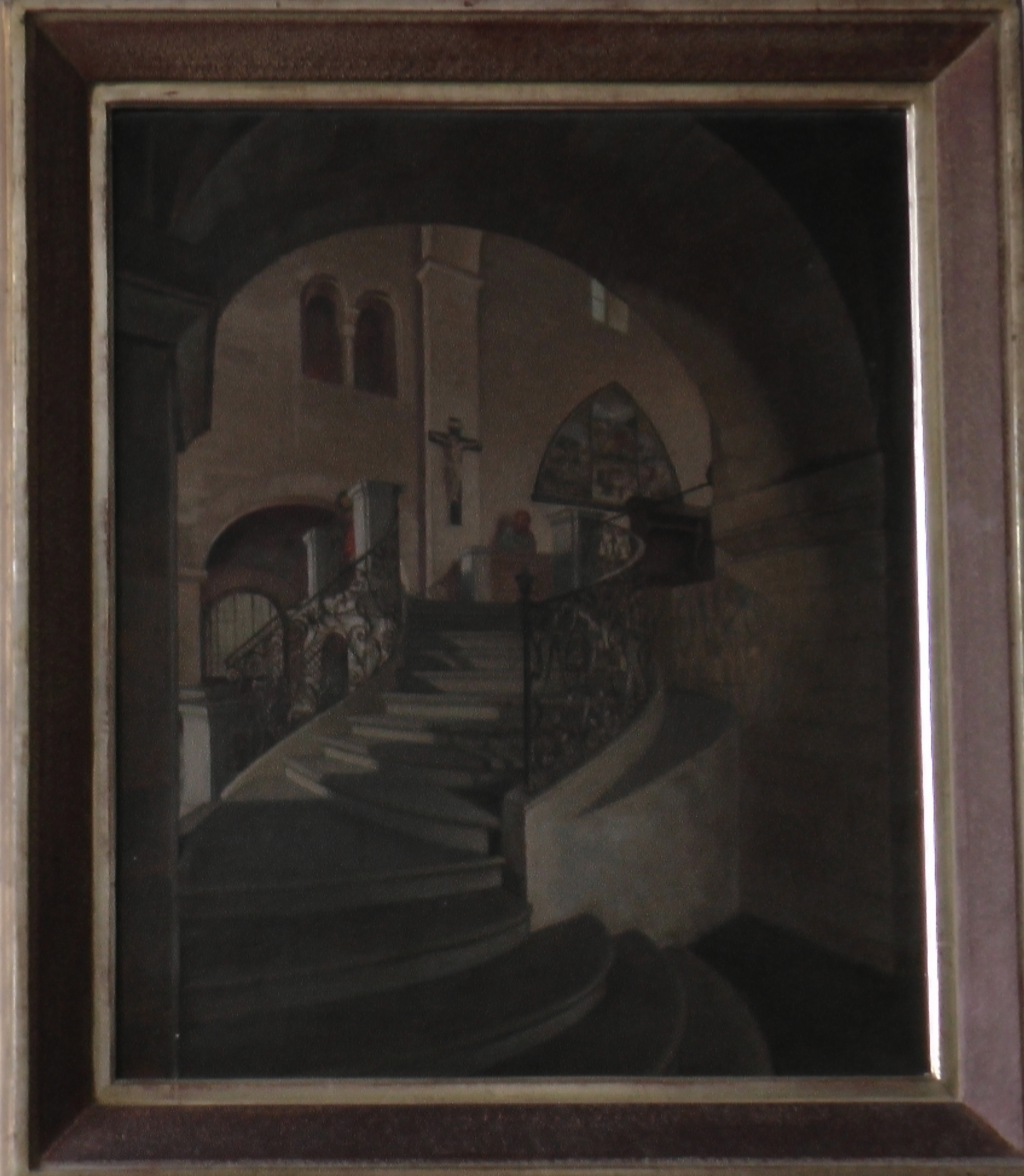 Jiljí. Popis v článku: Bazilika sv. Jiří - schodiště do presbyteria, olej, signován.